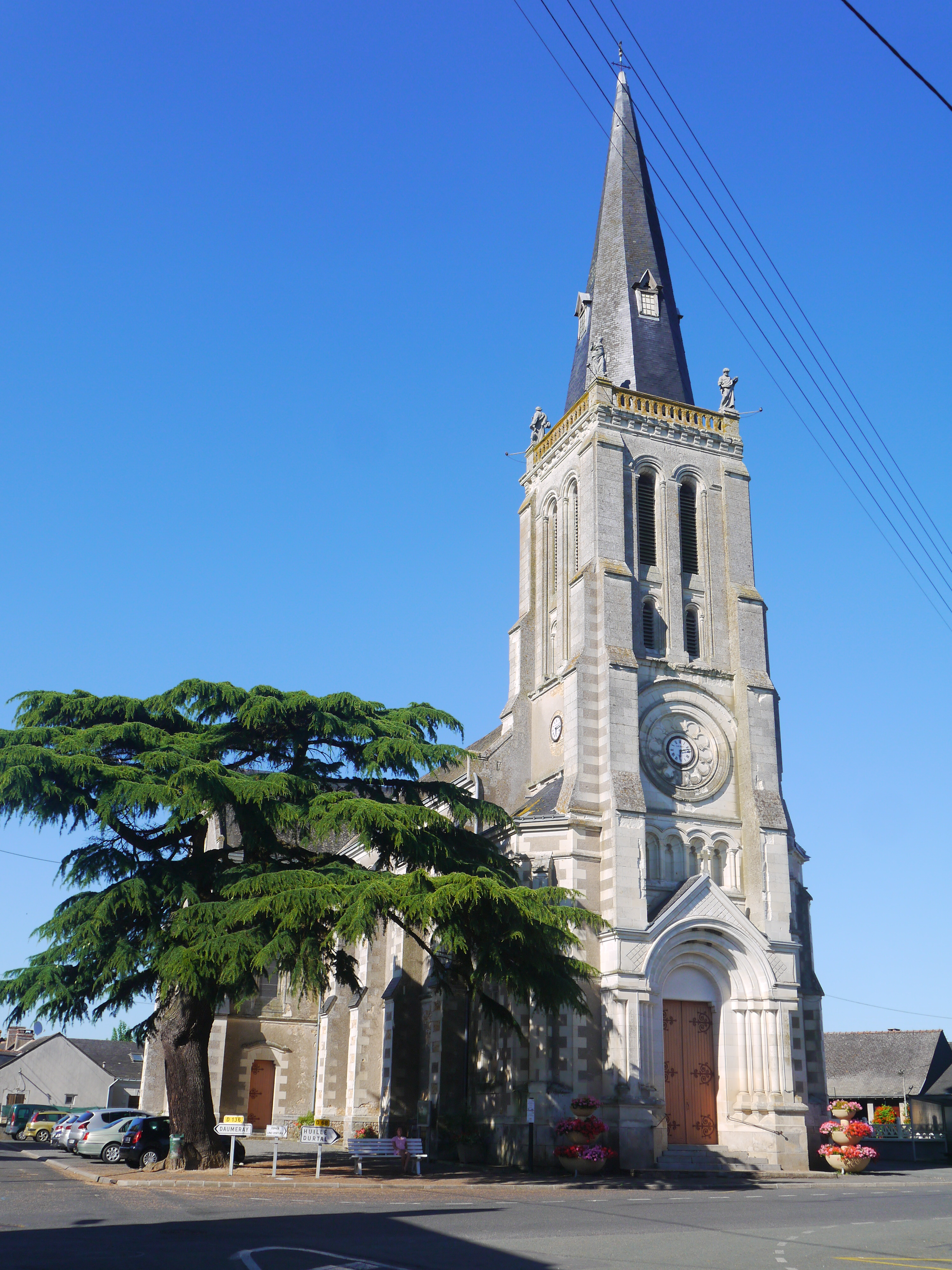 L'église Saint-Aubin en 2016.